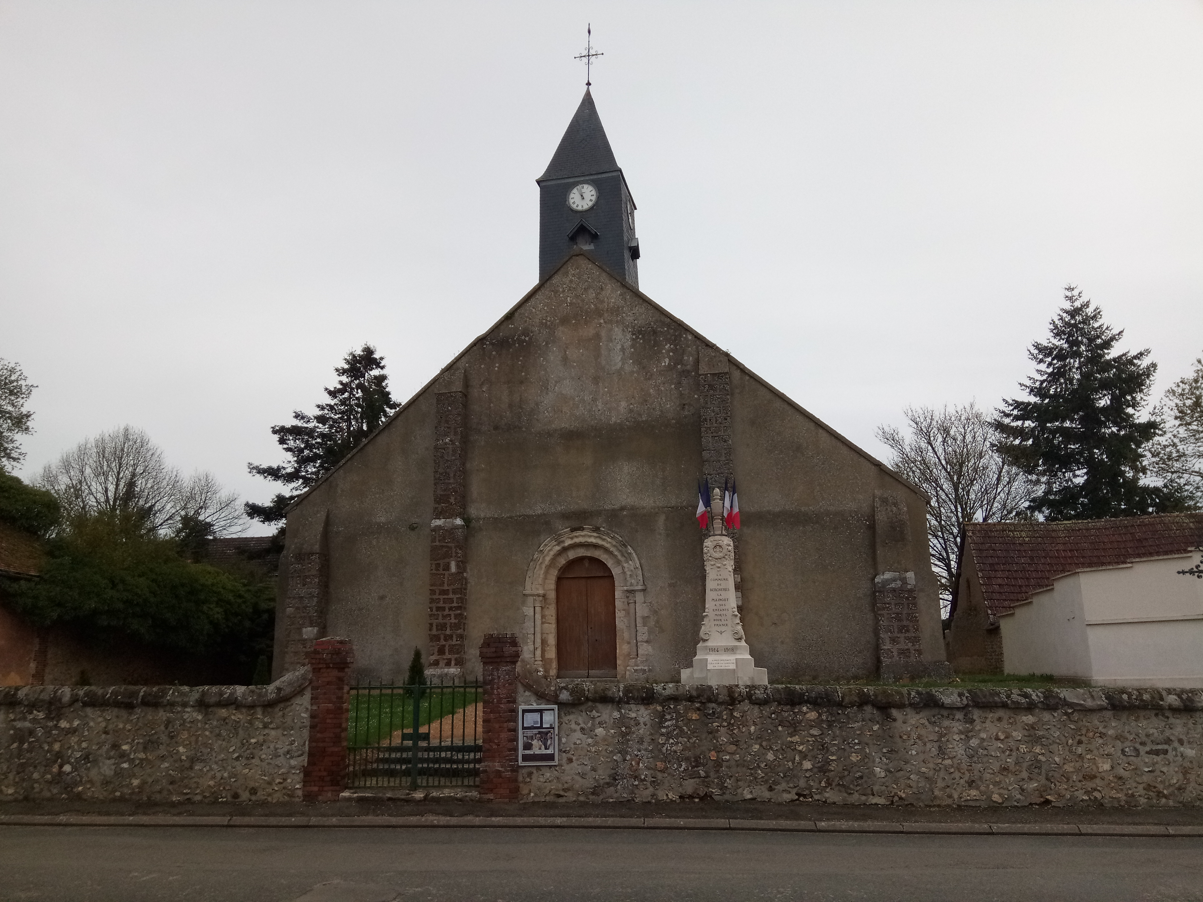 Église Saint-Pierre